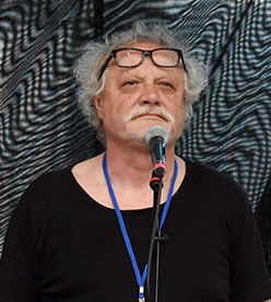 Marián Geišberg